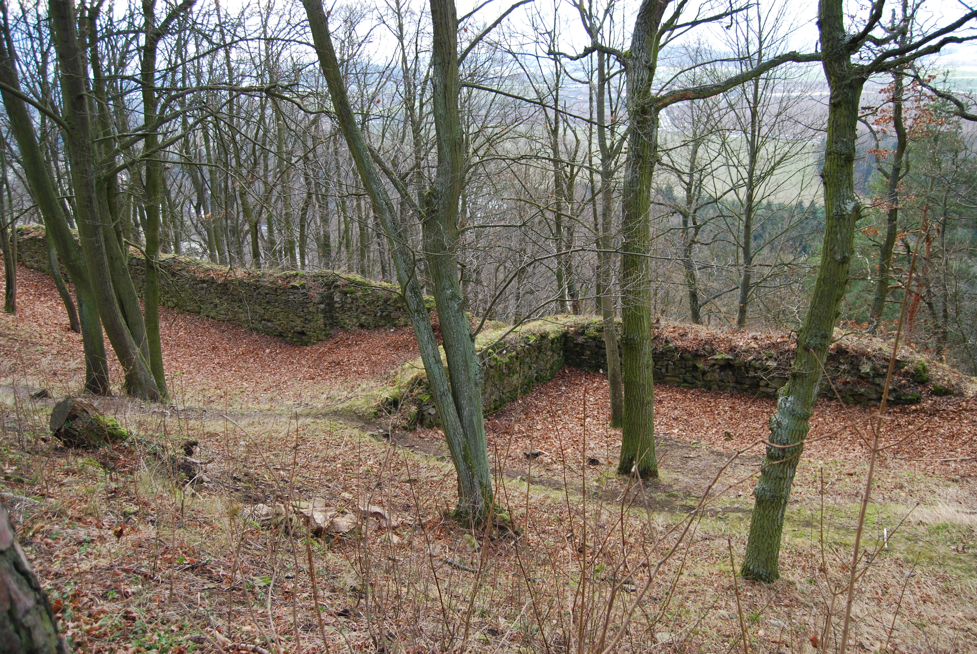 Zbytky místností severního křídla. Prácheň - zřícenina gotického hradu na skále nad Otavou u Horažďovic. Okres Klatovy. Česká republika.